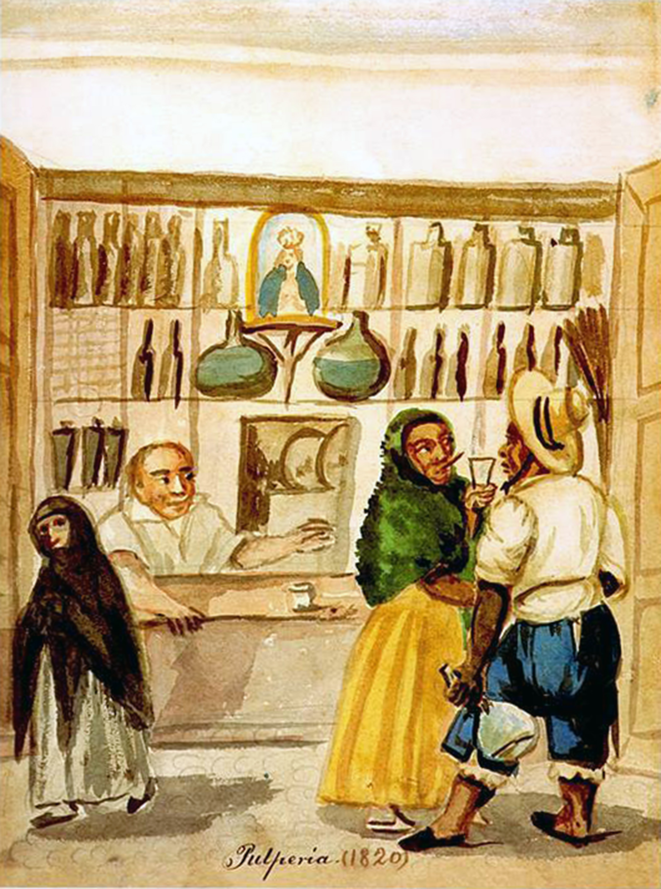 Acuarela de (Lima, 1807 - Lima, 1879)